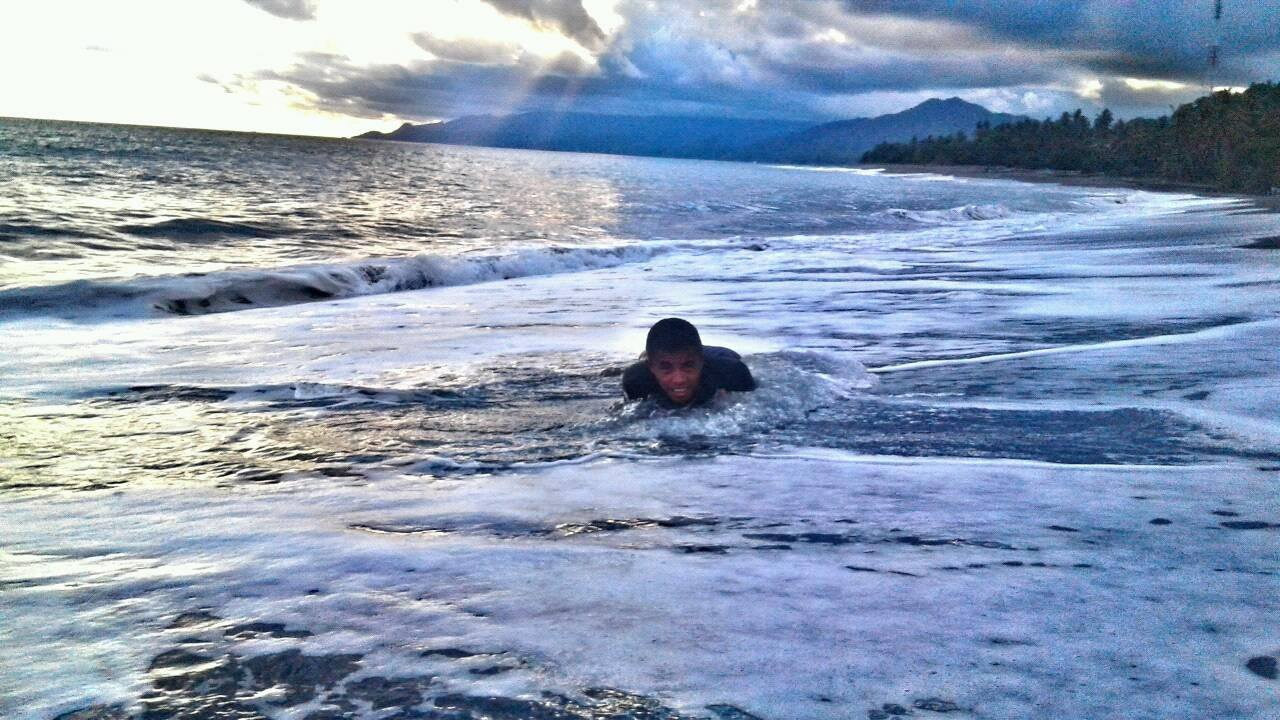 Pantai Watutedang